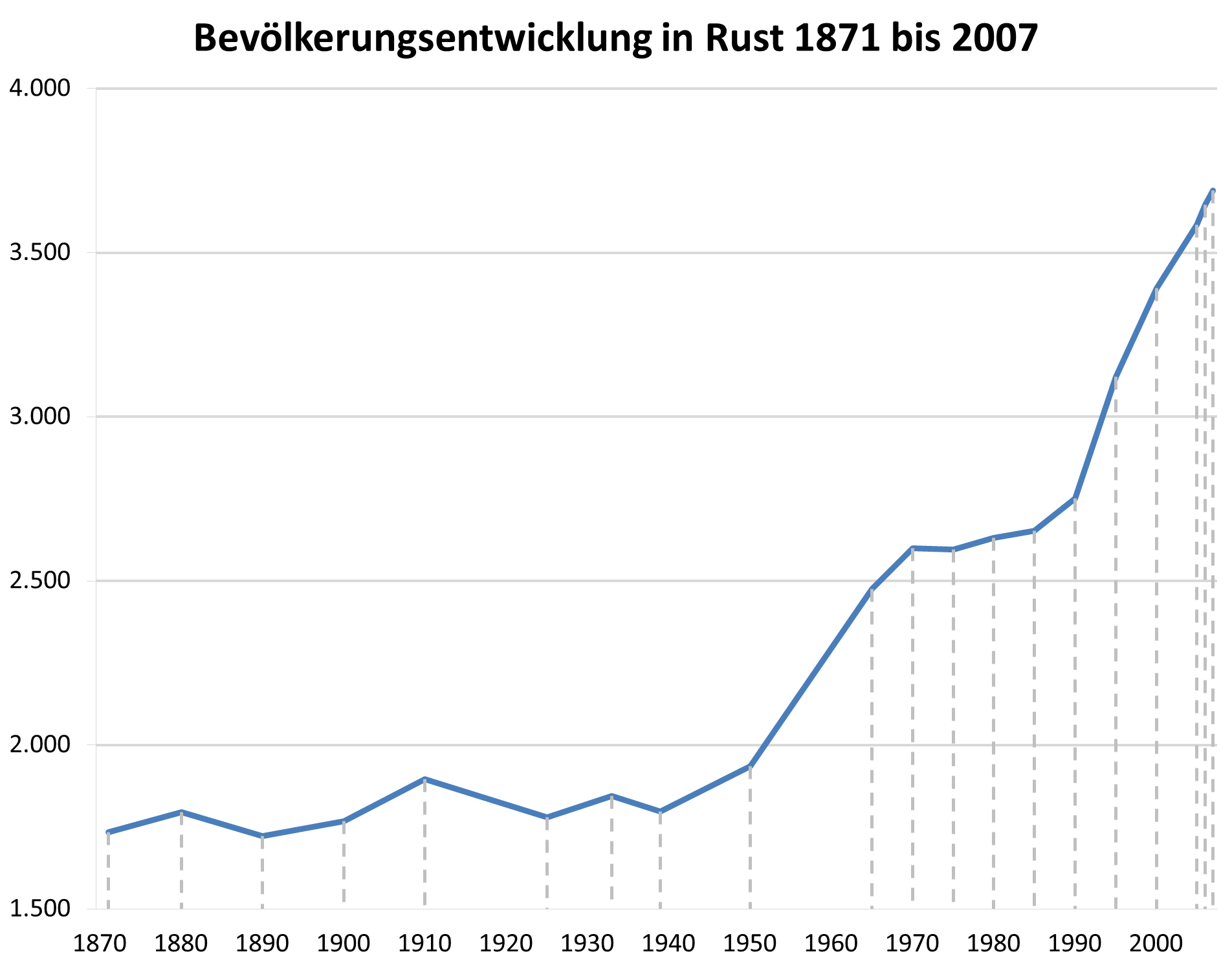 Bevölkerungsentwicklung der Gemeinde Rust von 1971 bis 2007